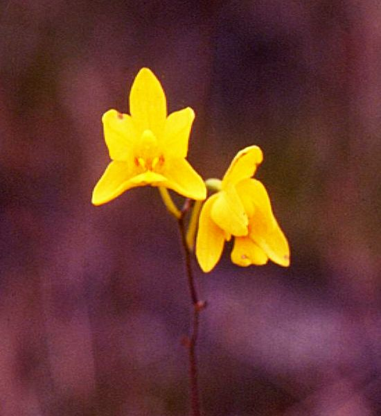 Spathoglottis affinis, Orchideen (Orchidaceae) - Kambodscha/Cambodia, Phnom Bokor Nationalpark, in der Nähe des Popokvil-Wasserfalls (Prov. Kampot)